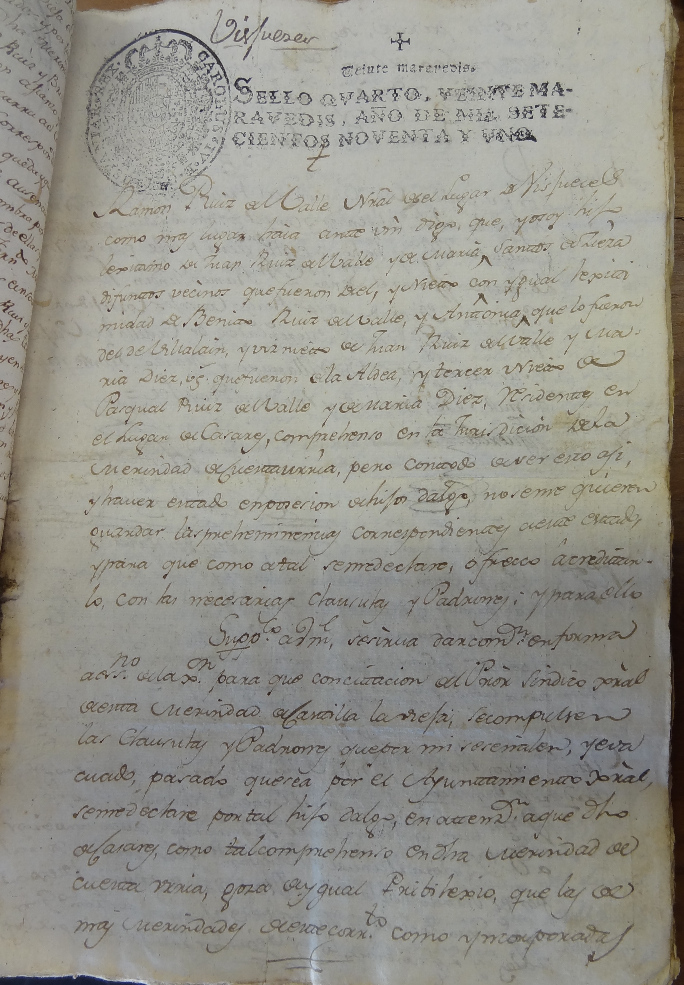 Information of Nobility 1791 de D. Rufo Ramón Ruiz del Valle